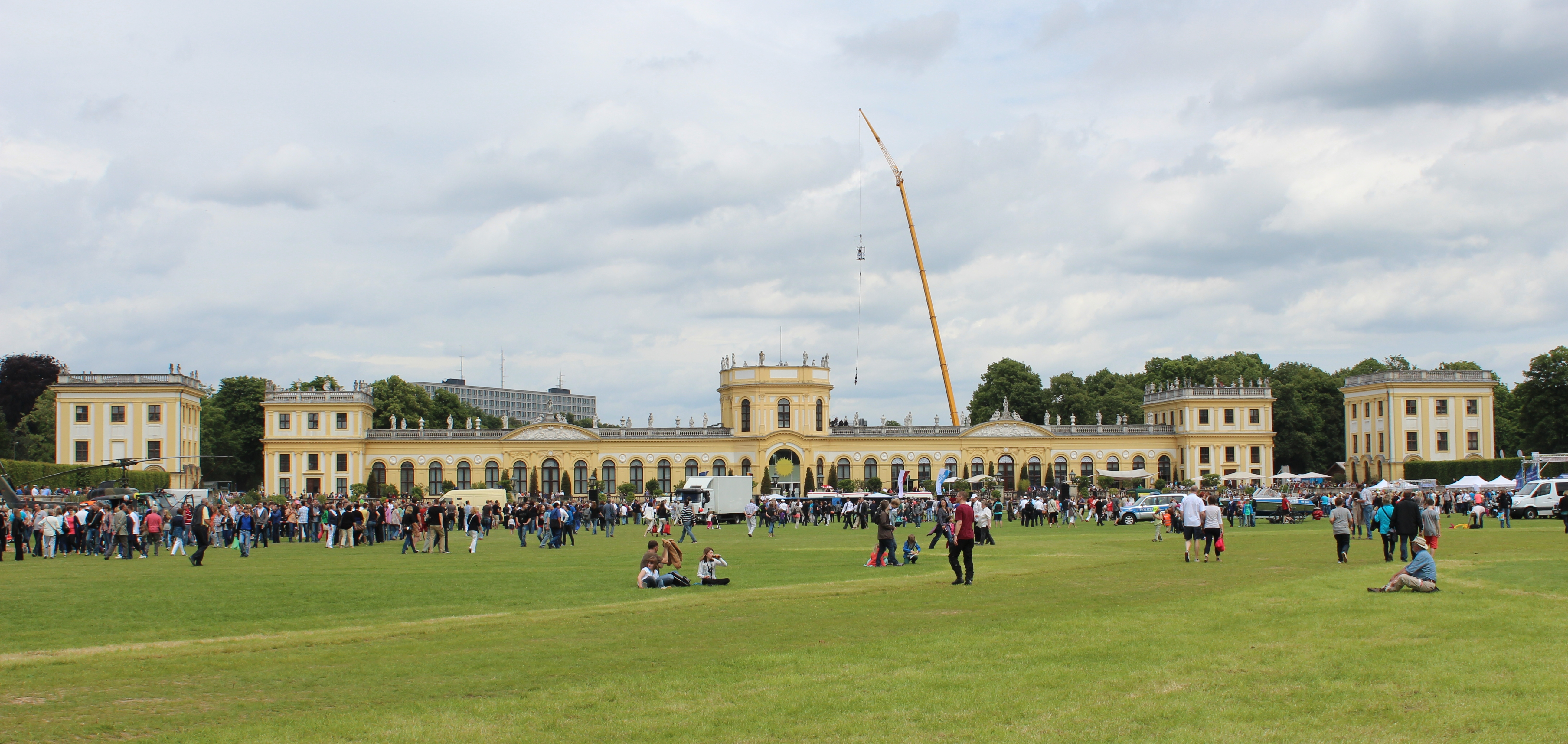 Die Orangerie während des Hessentags 2013 in Kassel.